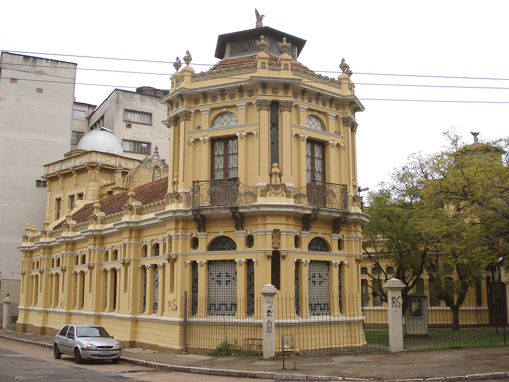 Castelinho, um prédio histórico da Universidade Federal do Rio Grande do Sul, Porto Alegre, Brasil.